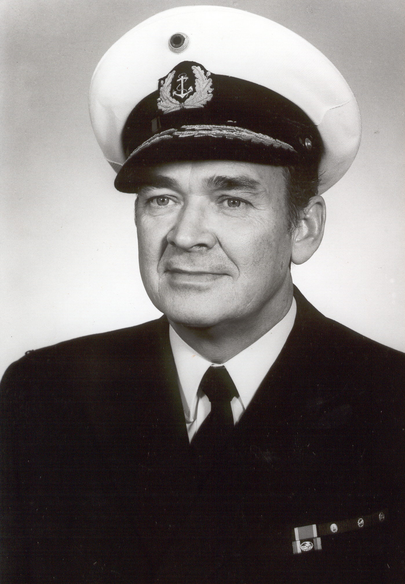 Porträtfotografie von Flottillenadmiral Wilfried Toepser